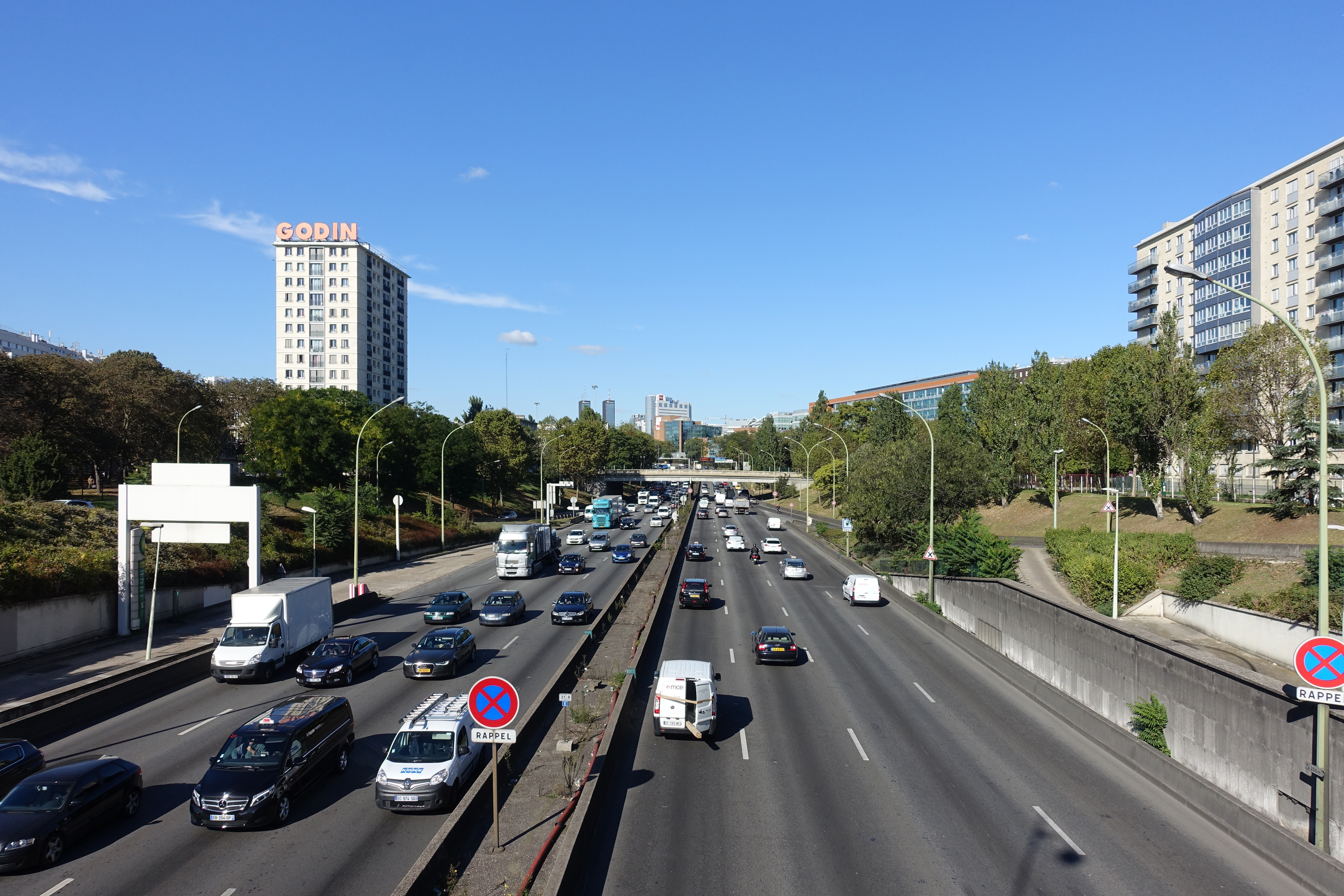 Cars @ Périphérique @ Paris